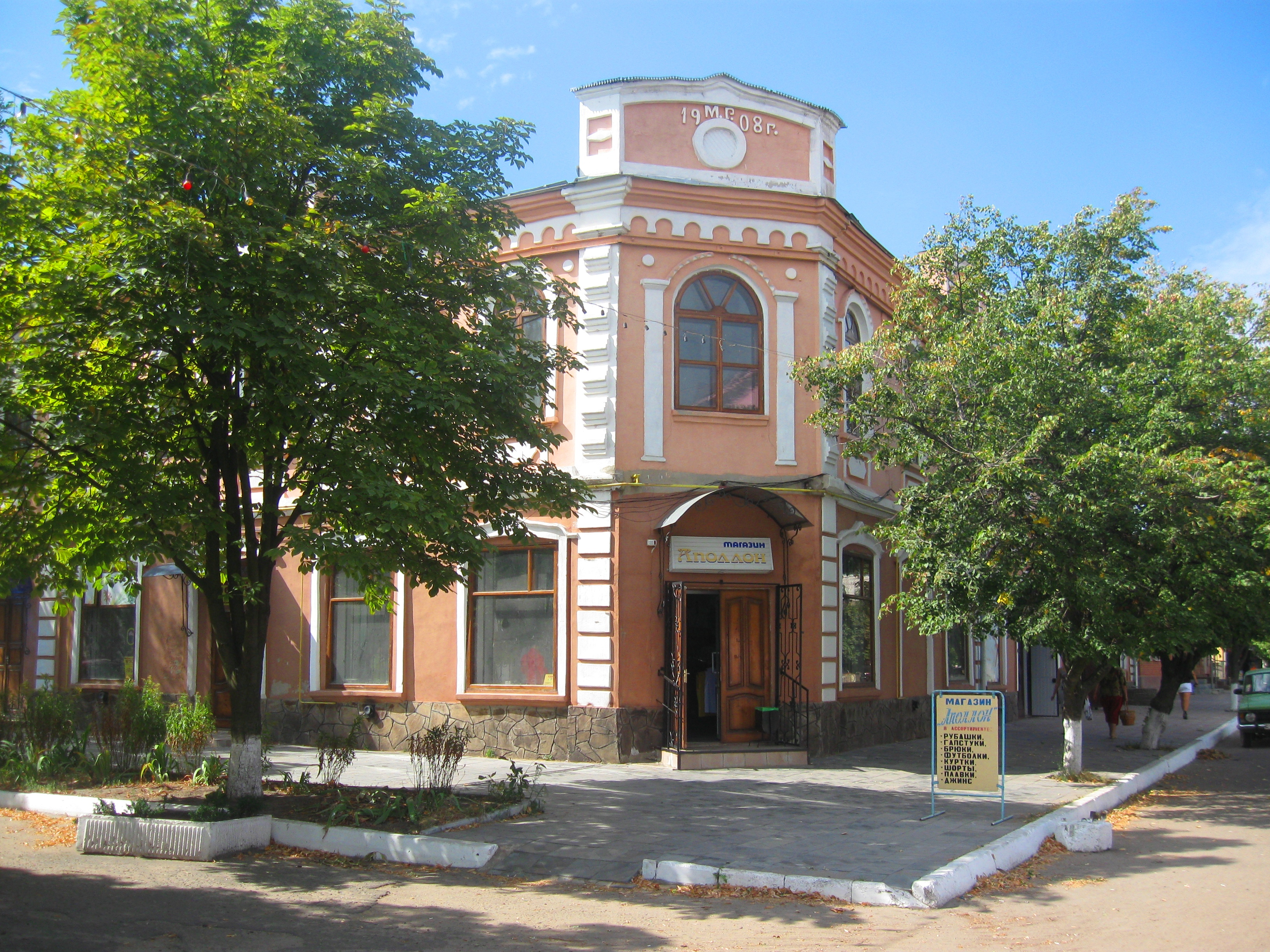 Будинок Руднєва м. Старобільськ